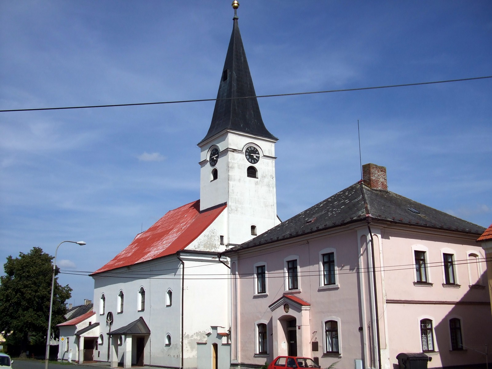 Kostel a fara v Mrákově v okresu Domažlice, Plzeňský kraj